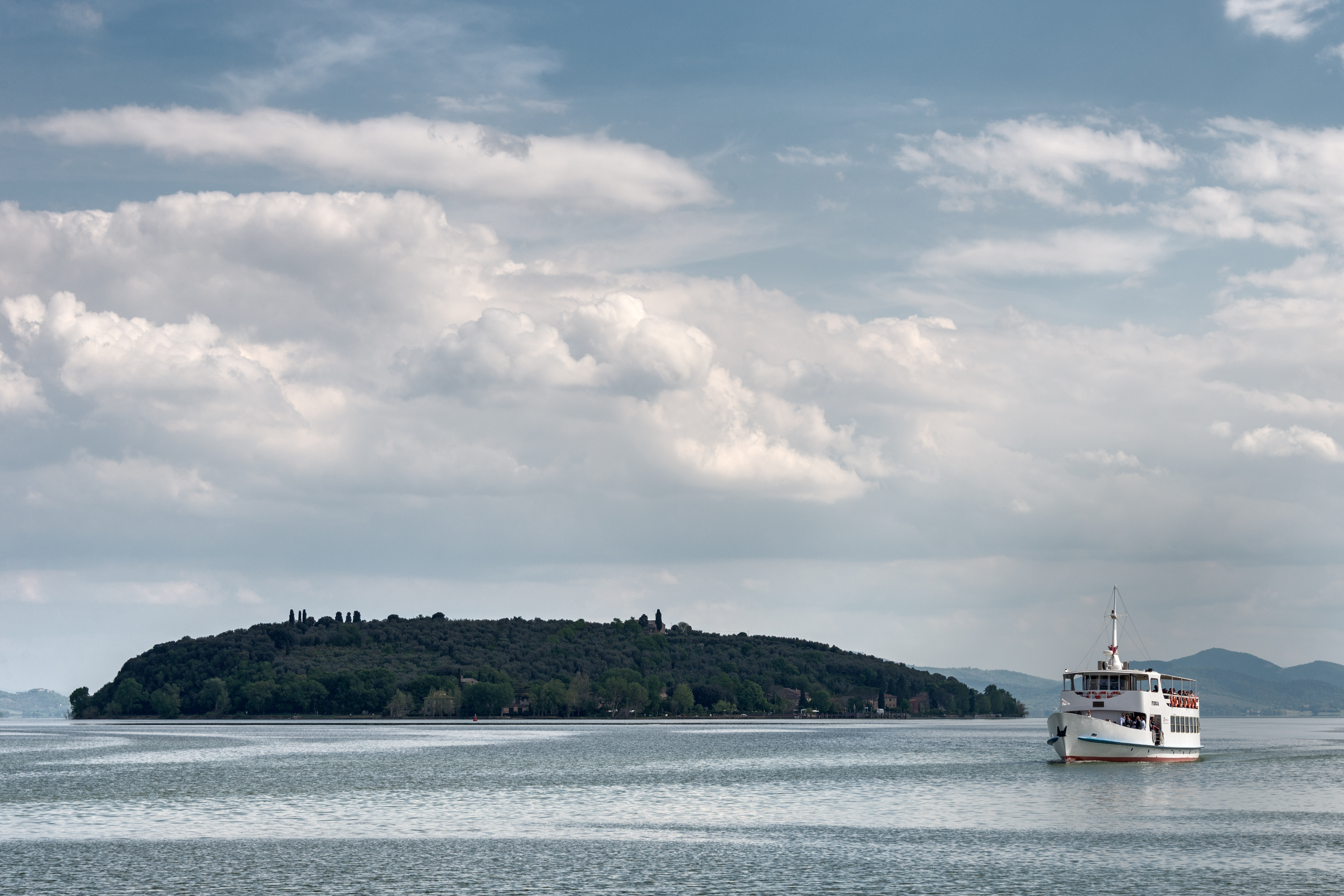 Isola Maggiore - Tuoro sul Trasimeno, Perugia, Italia